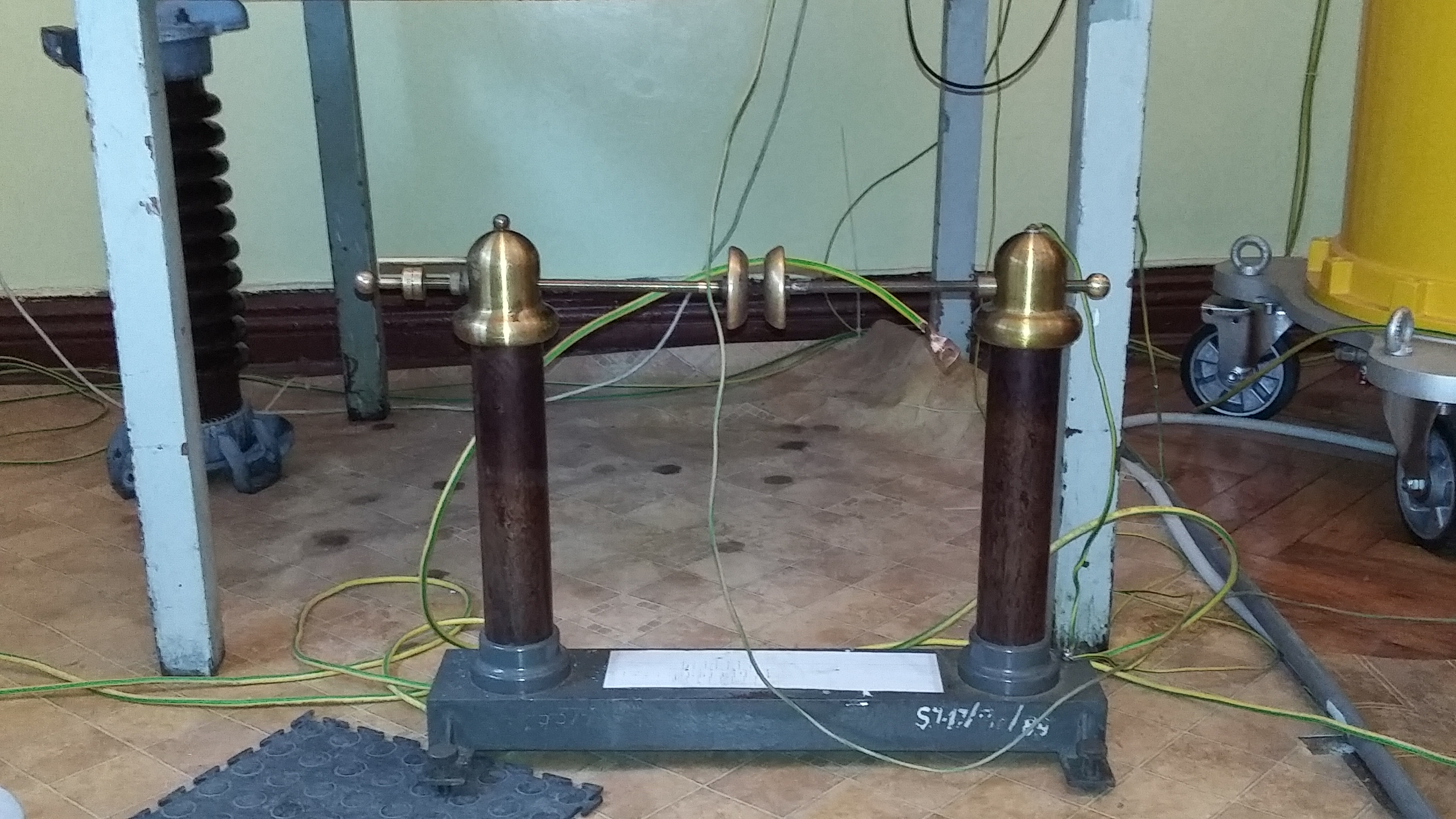 Laboratoryjny iskiernik z elektrodami płaskimi